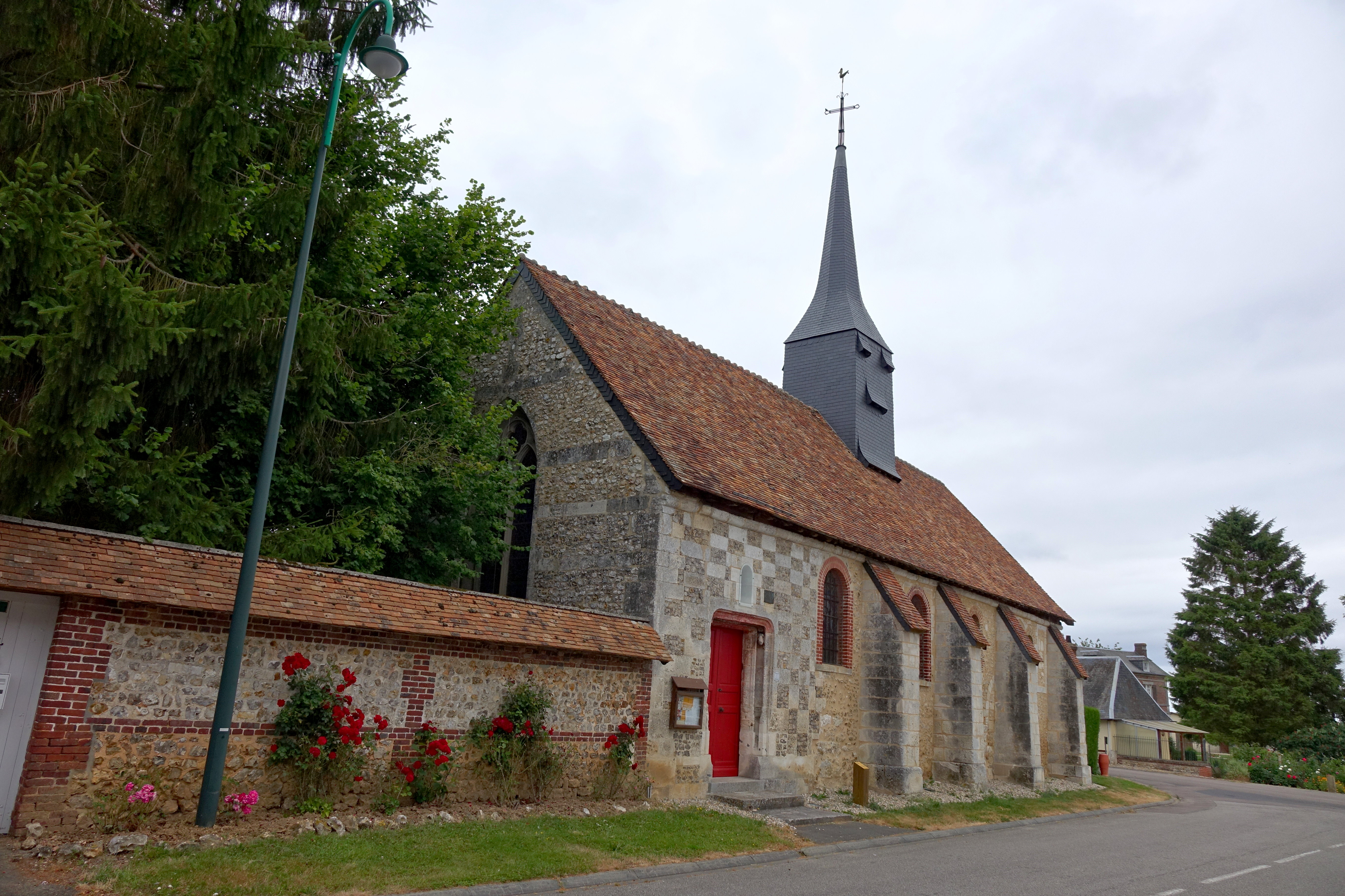 Église Saint-Nicolas de La Haye-de-Calleville, Eure, France